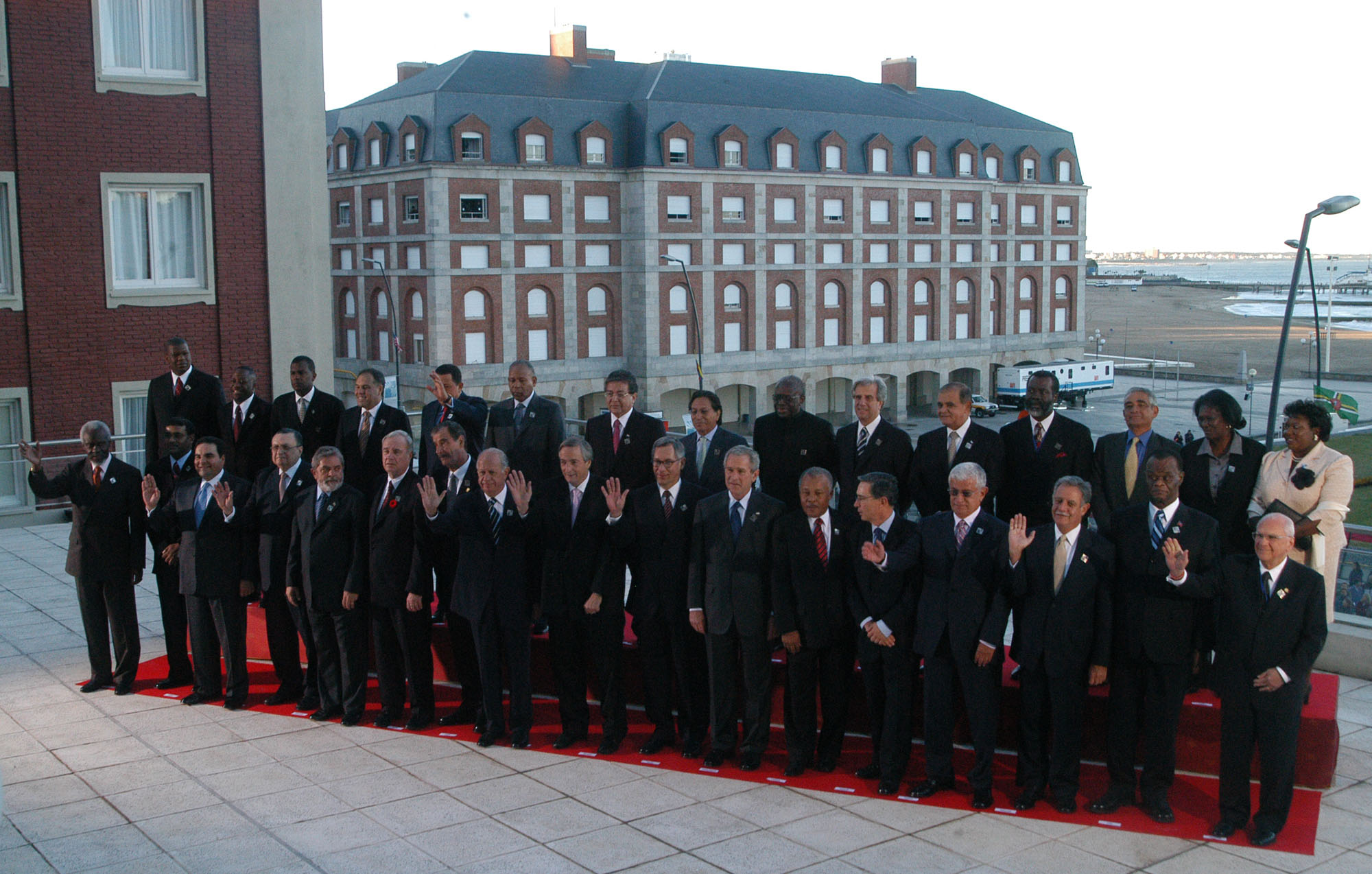 IV Cumbre de las Américas. Foto de los presidentes. Mar del Plata. 4 de noviembre de 2005. foto oficial